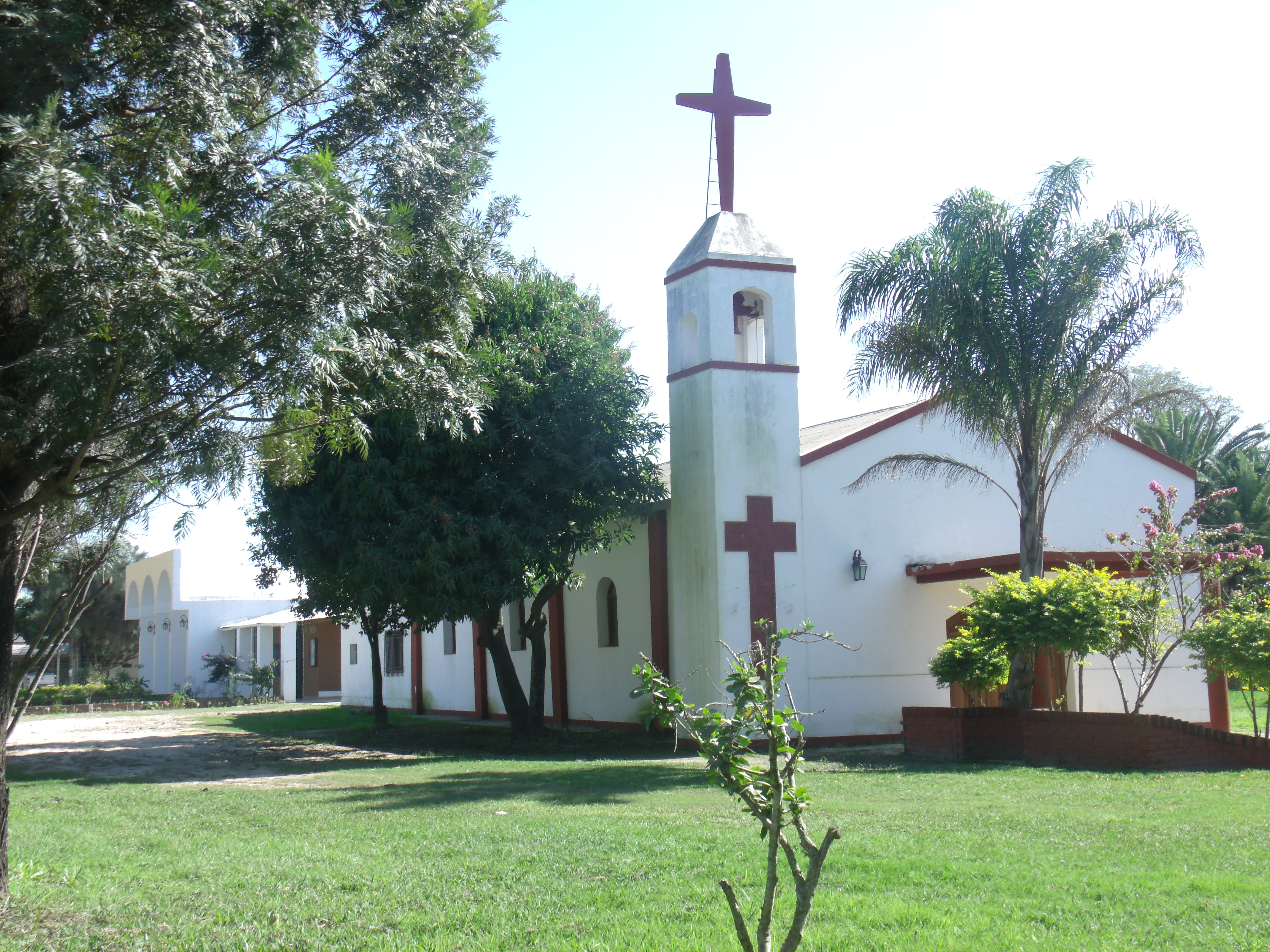 Fachada y lateral de templo católico en El Colorado, Formosa